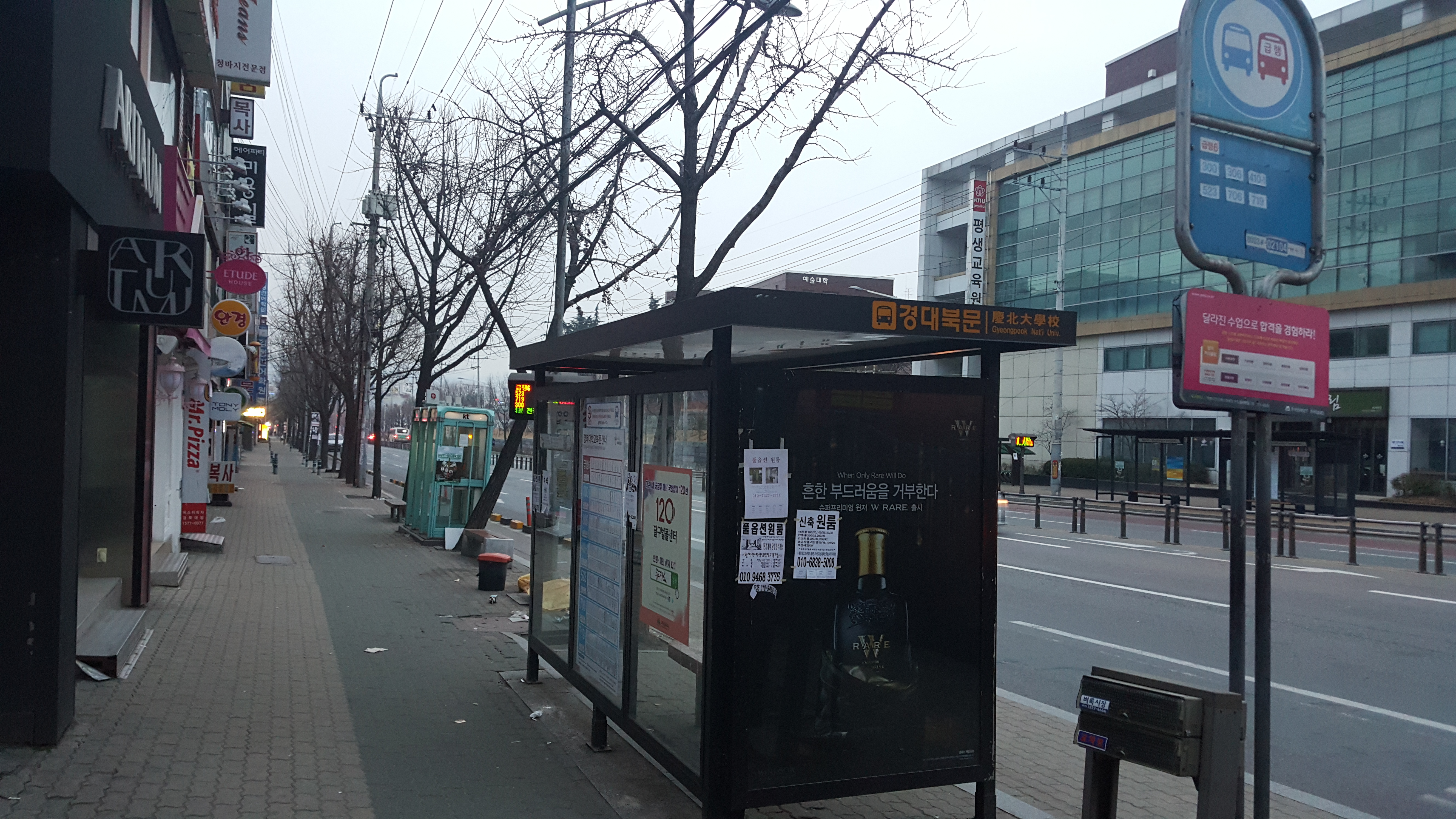 2016년 2월 경북대학교 북문건너 버스정류장